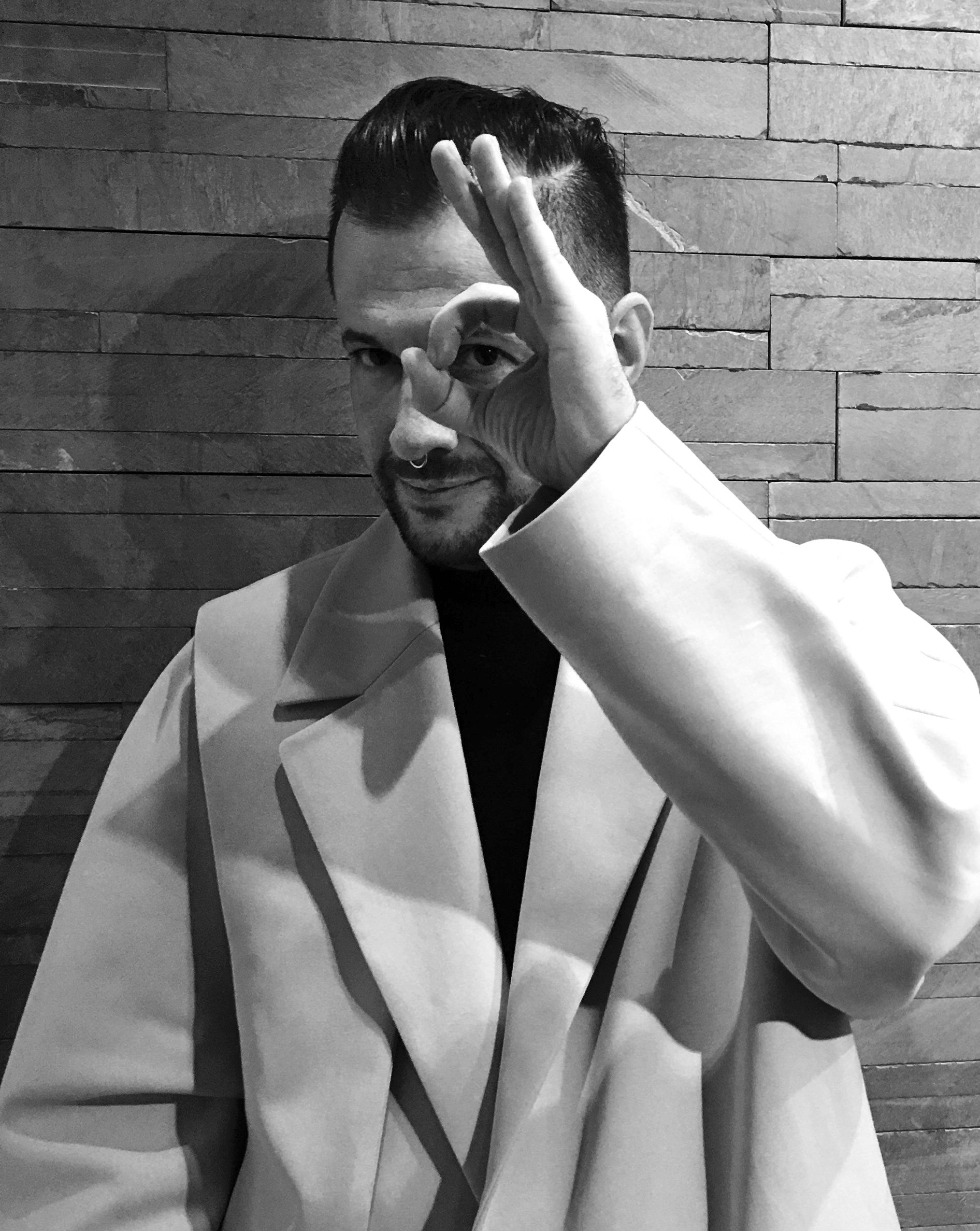 Portrait de l'artiste Loris Gréaud